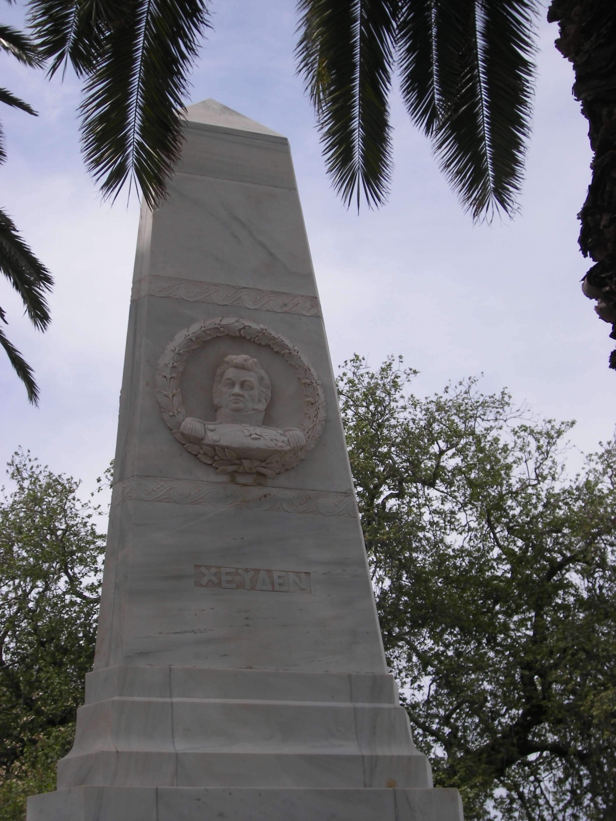 Monument commémoratif / Memorial (Pylos). Hommage à Heyden.